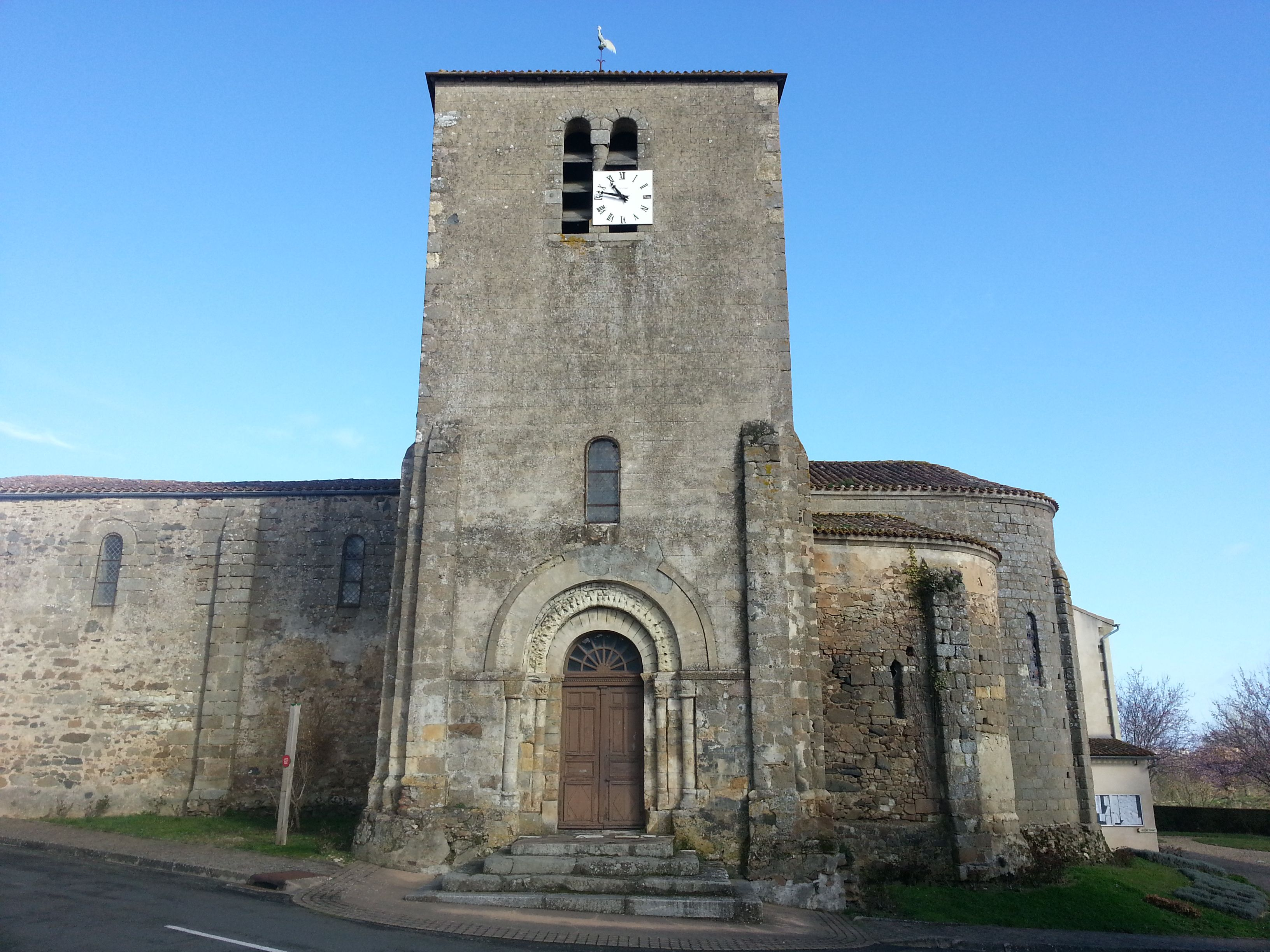 Façade Sud de l'Eglise St Martin de Glénay.